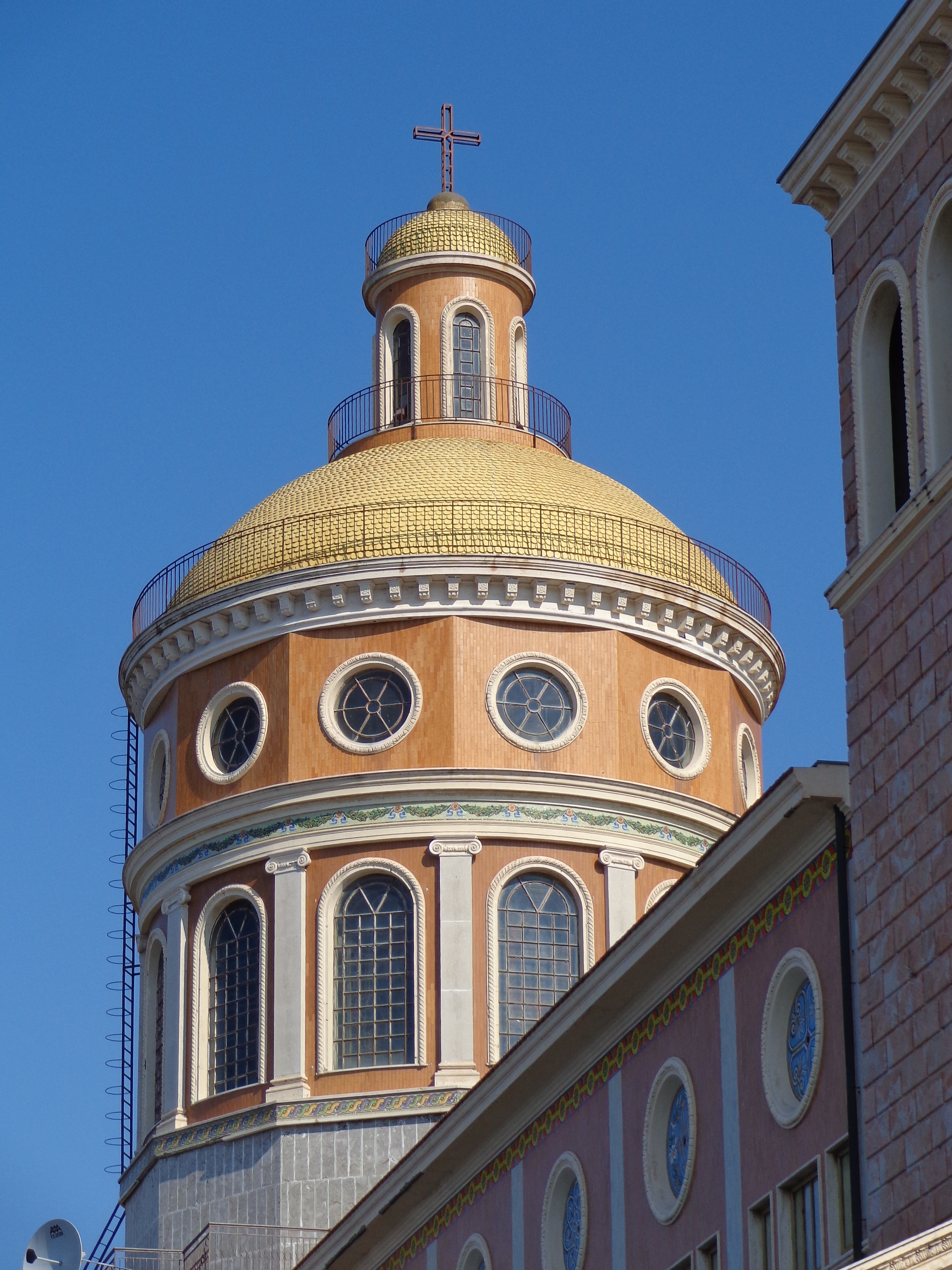 La cupola